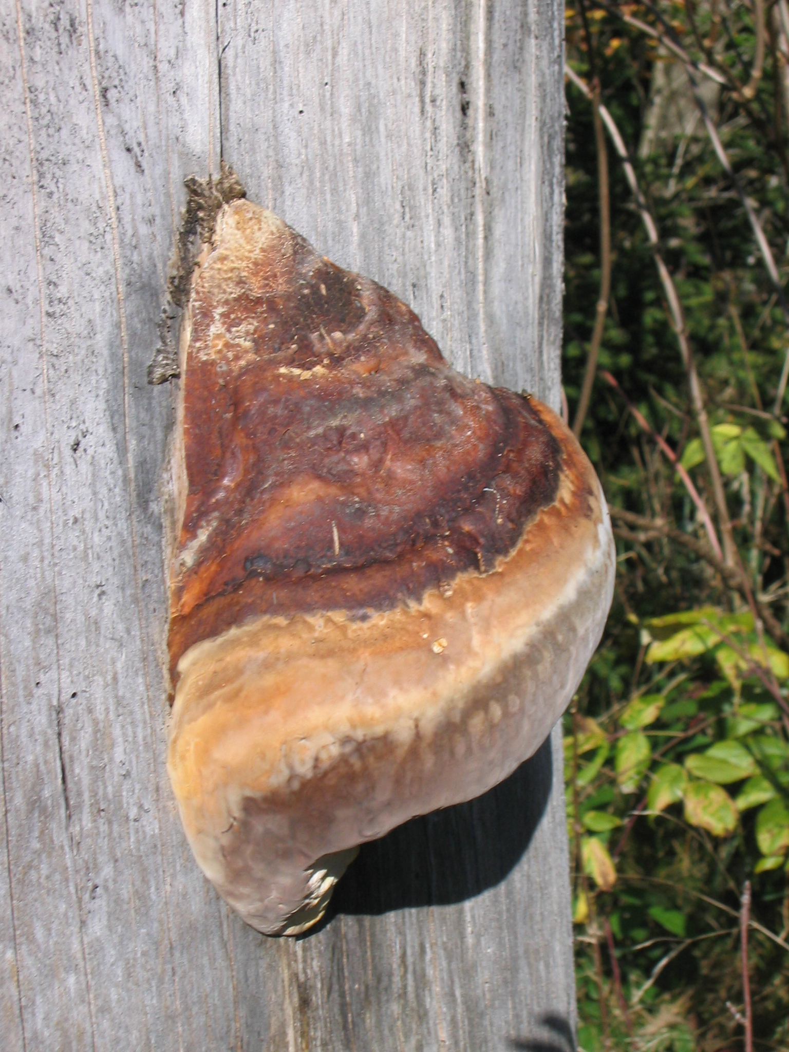 Fichtenporling (Fomitopsis pinicola), ebenso bekannt als Rotrandiger Baumschwamm laut [1]